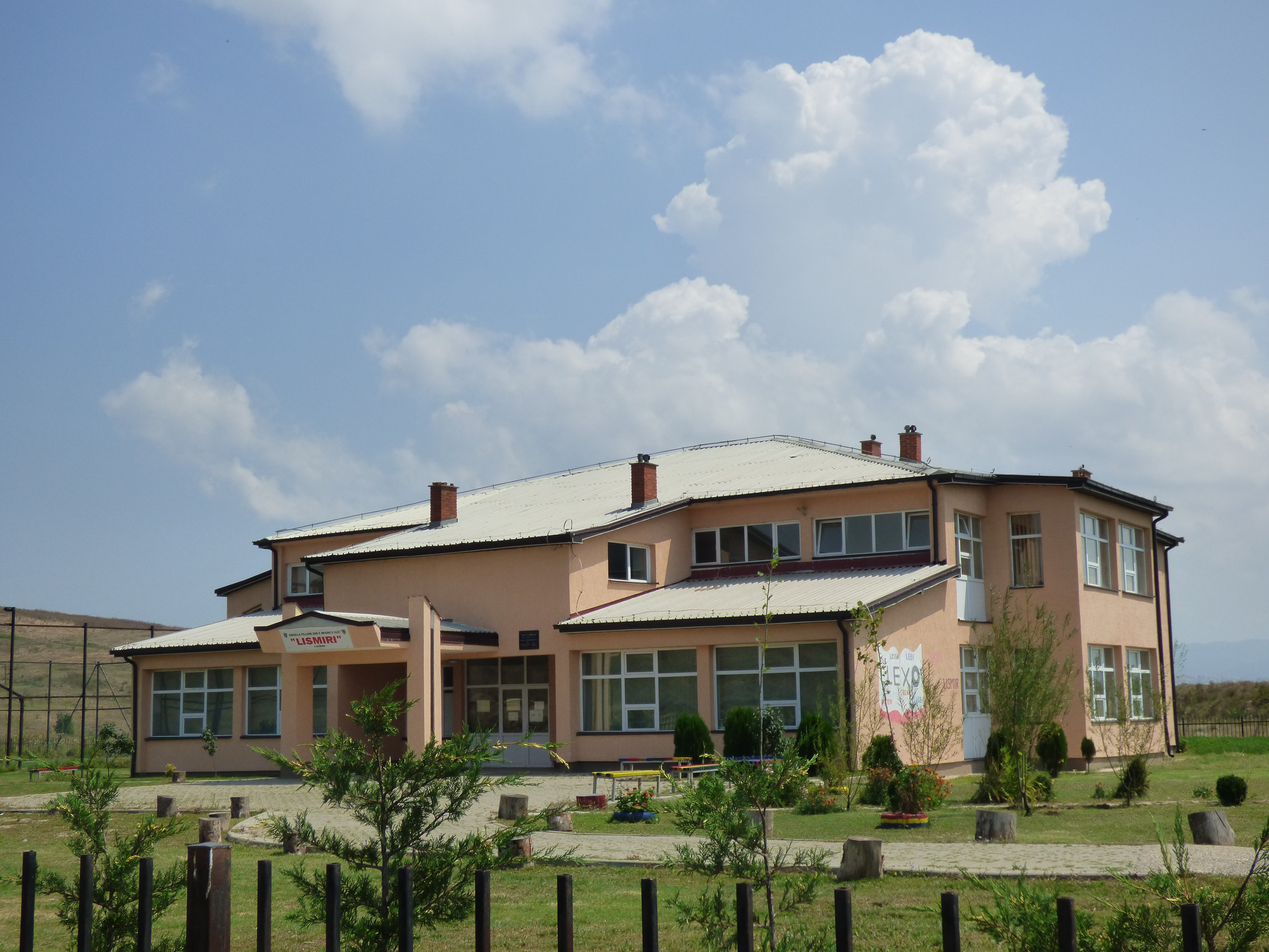 Die Schule von Lismir